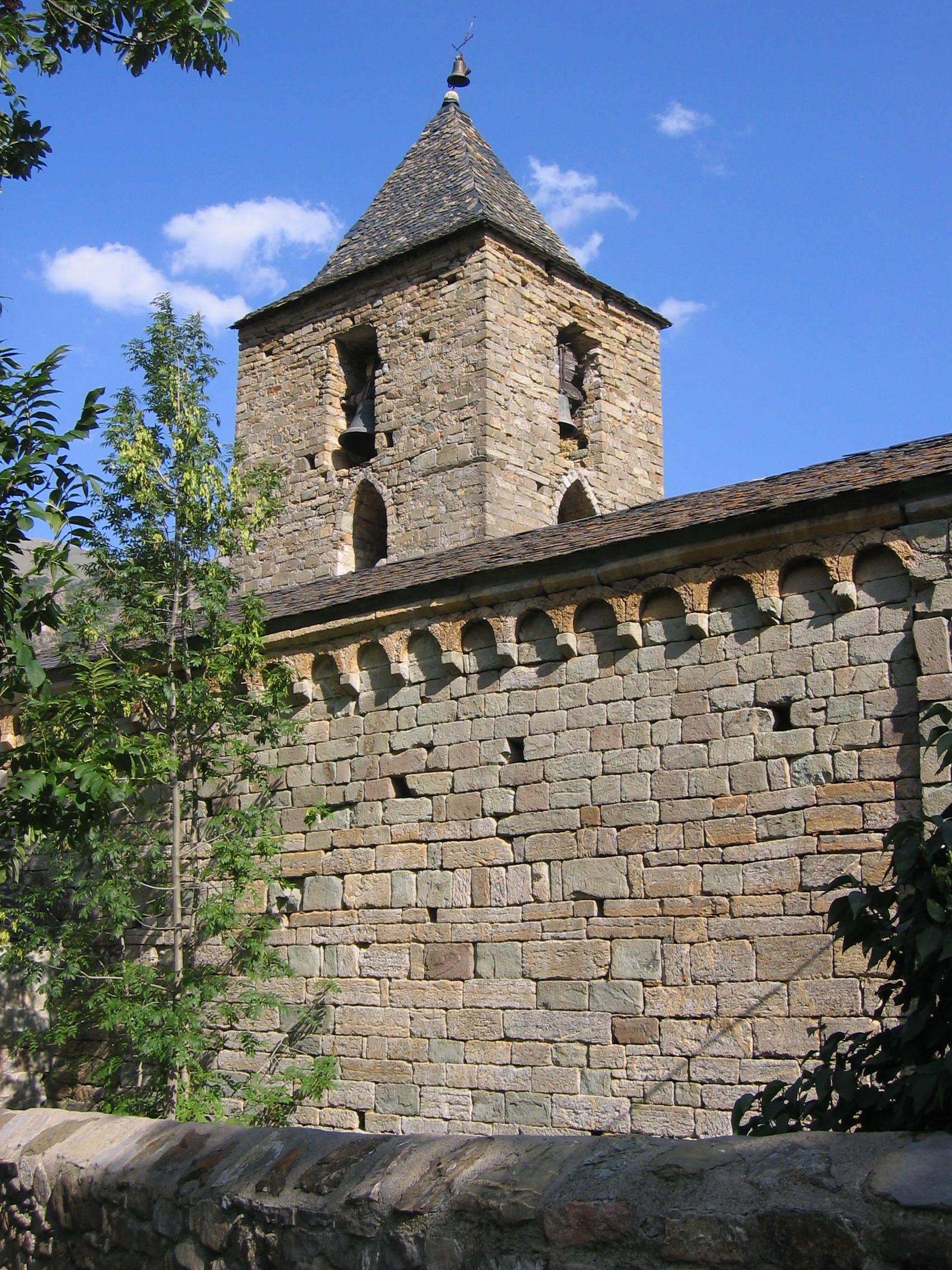 Santa Maria de Cóll church